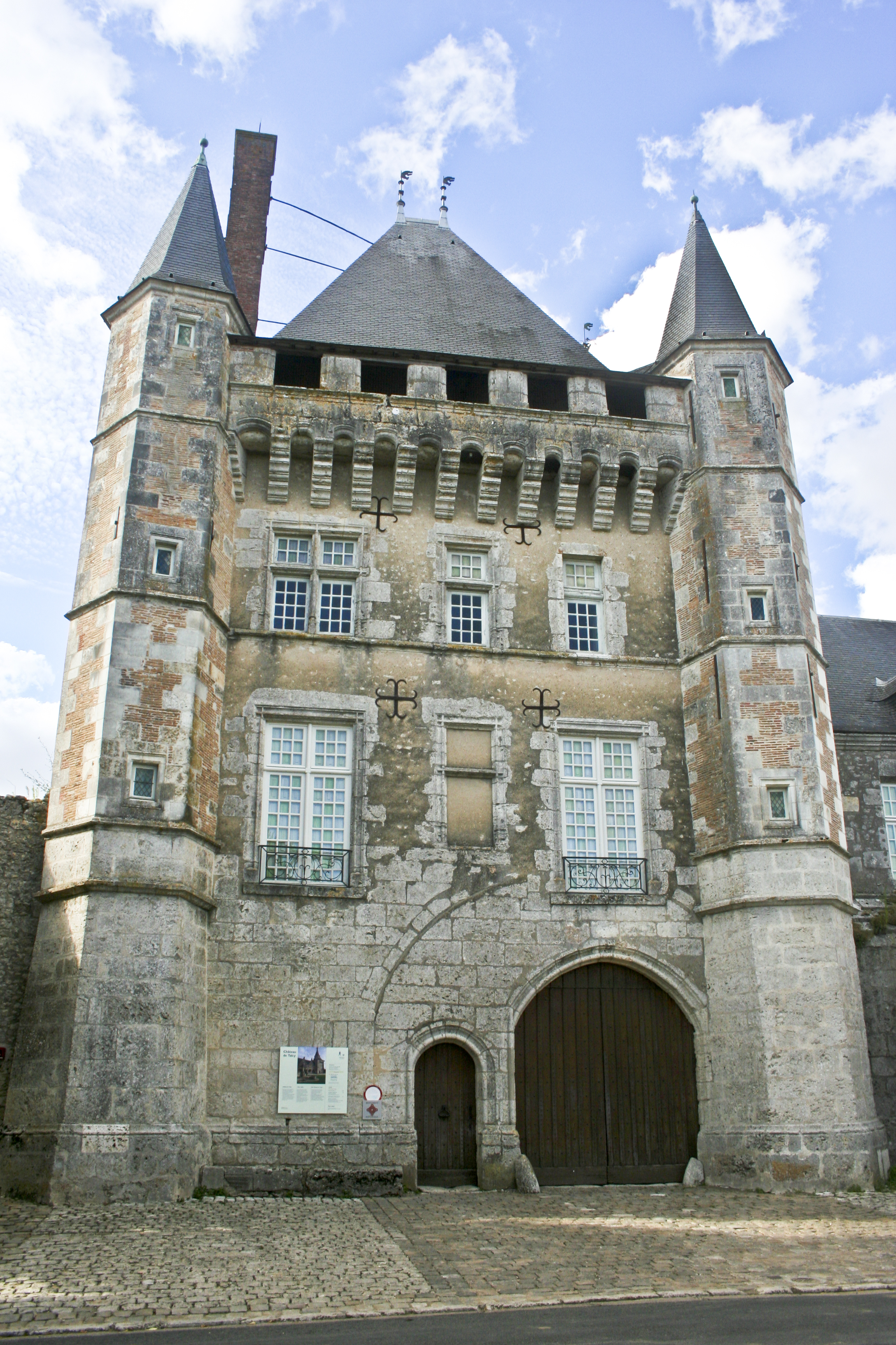 Château de Talcy (Loir-et-Cher), façade